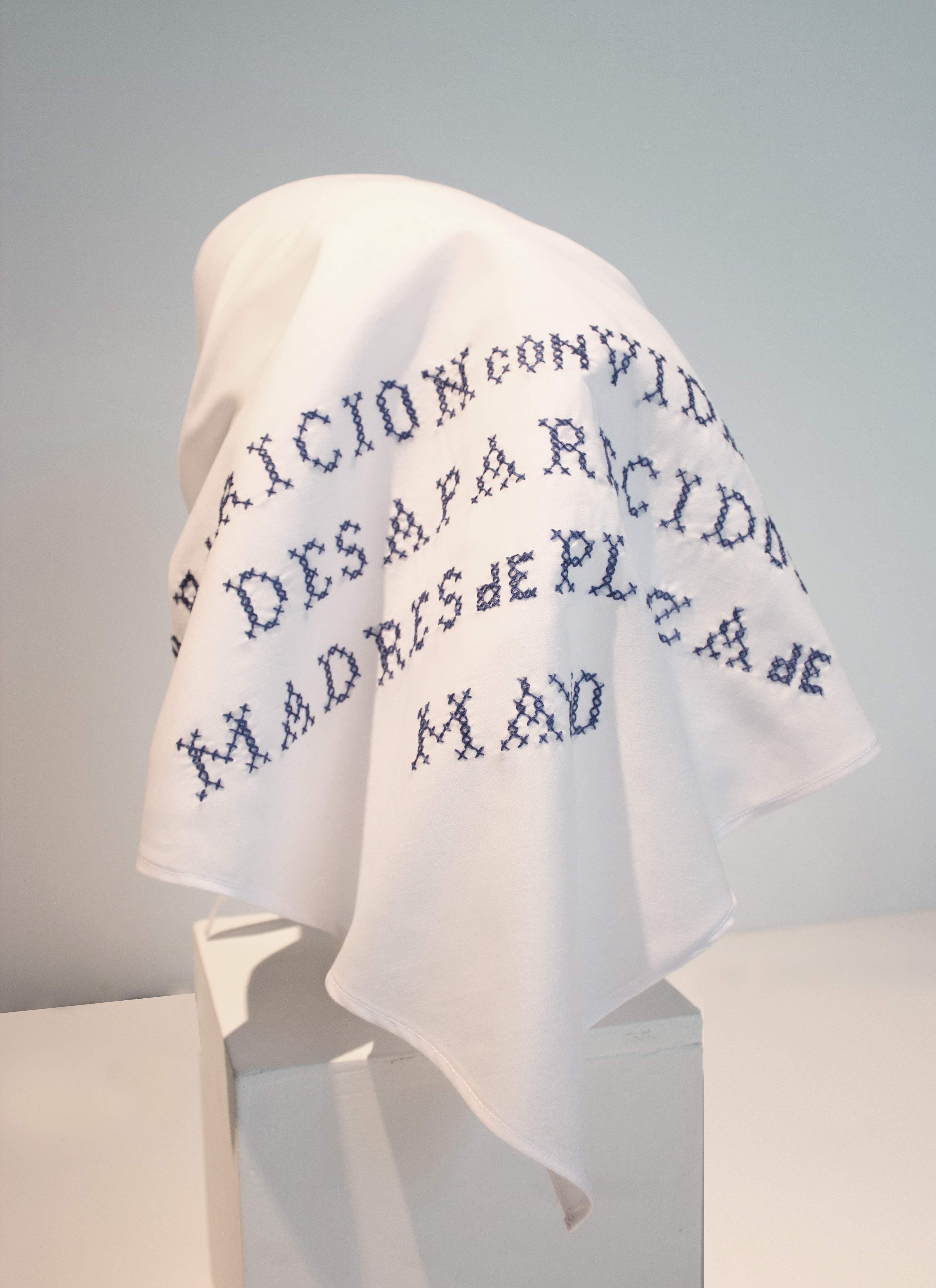 Pañuelo bordado con leyenda "Aparición con vida de los desaparecidos / Madres de Plaza de Mayo". Ha sido y es símbolo del reclamo de las Madres desde el inicio de la desaparición forzada de sus hijos a manos de las fuerzas de la represión militar, llevada a cabo desde mediados de la década del '70 y hasta fines de la dictadura militar en el año 1983. Con este pañuelo sobre la cabeza, las Madres realizaron incansablemente marchas en reclamo de la aparición de sus hijos. El reclamo continúa y el pañuelo es vastamente reconocido nacional e internacionalmente y continúa siendo usado.